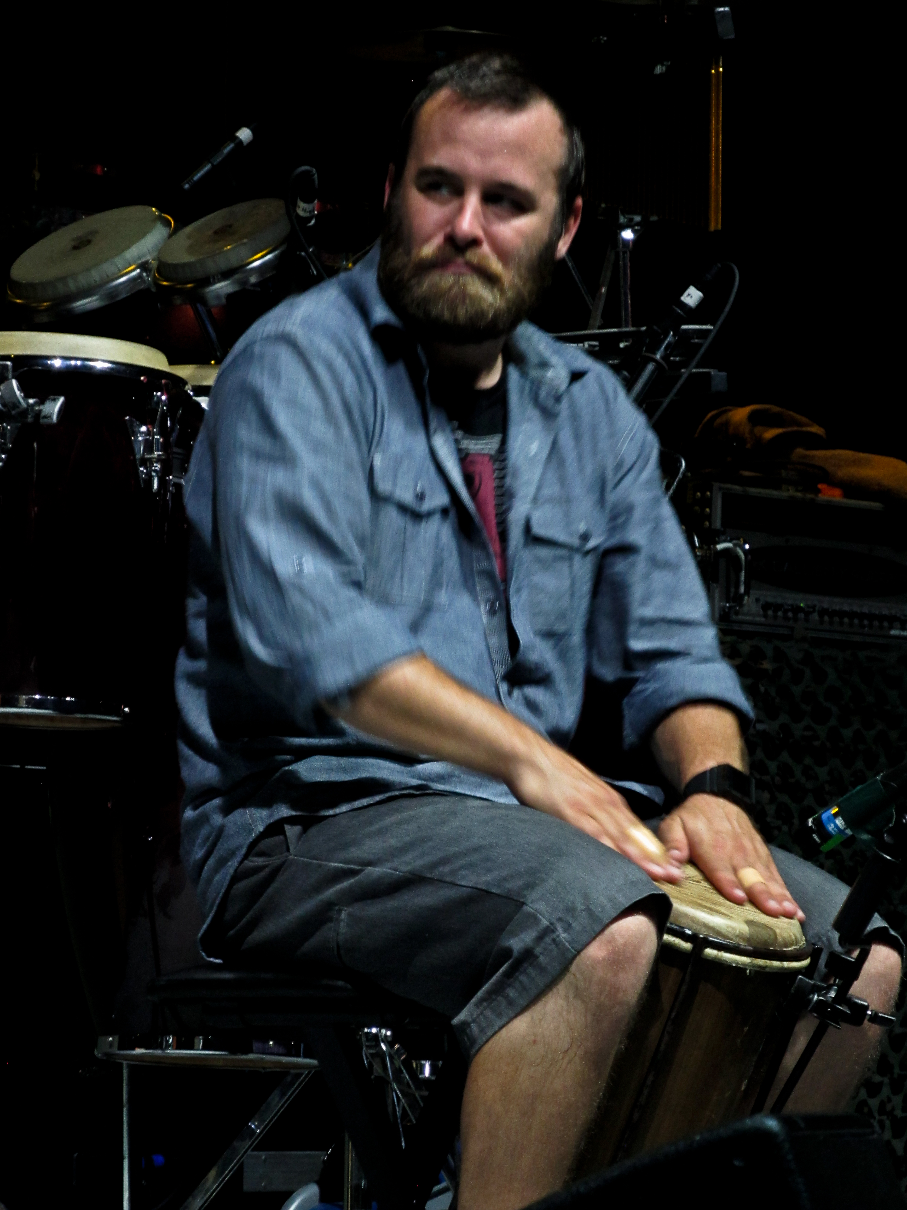 SOJA live at Merriweather Post Pavilion, August 13, 2011. Ken Brownell on the photo.